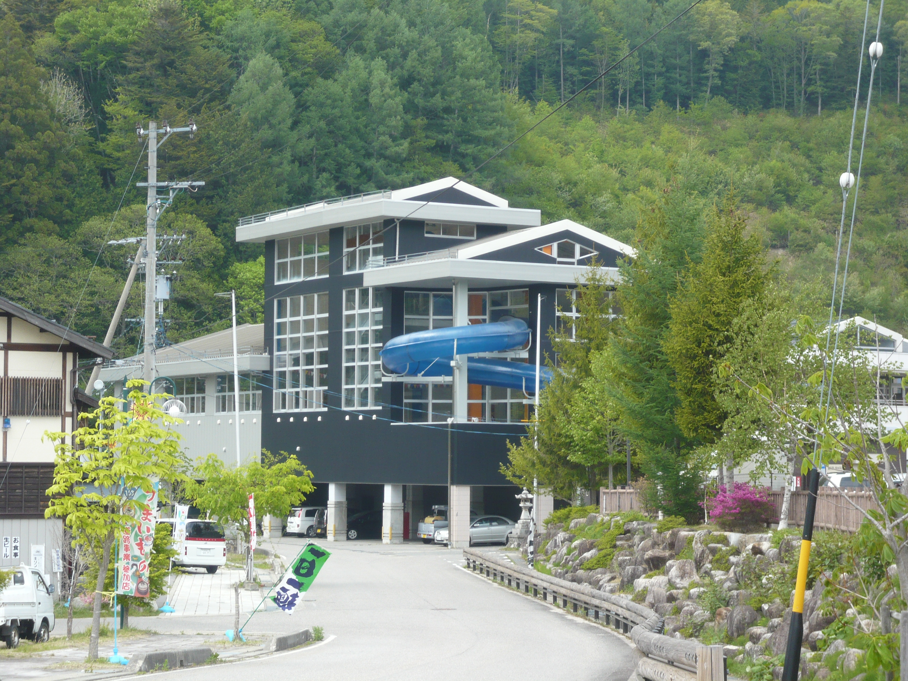 平谷温泉 ひまわりの湯